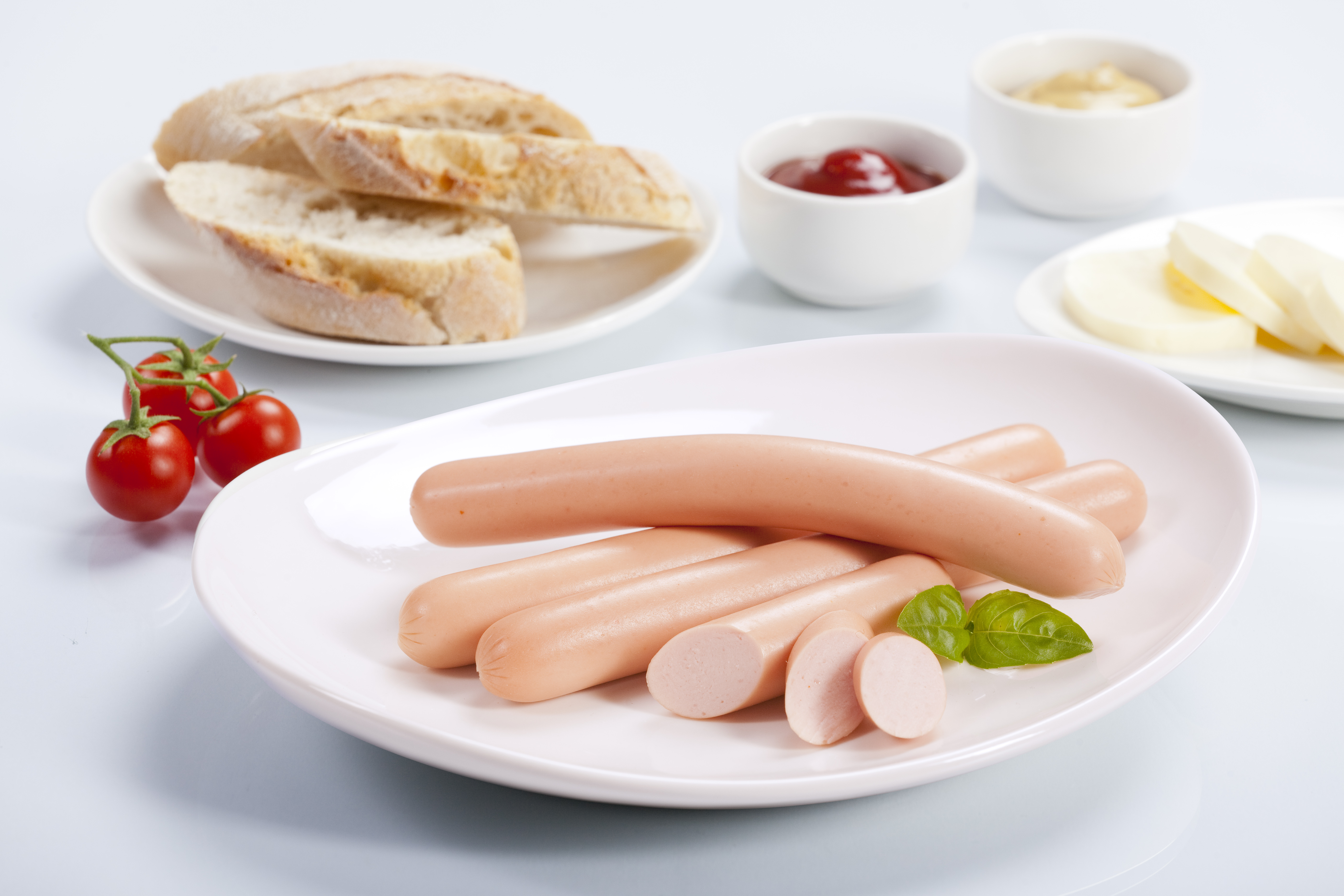 Parówki z szynki Sokołów SA